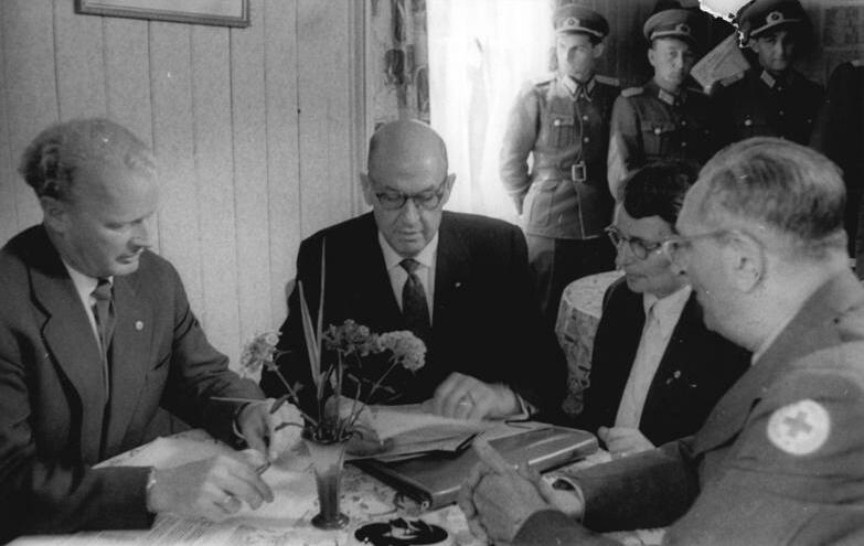 Zentralbild-Sturm 19.7.1958 Voigt-schä USA-Hubschrauber-Besatzung rückgeführt. Acht Offiziere und ein Feldwebel der amerikansichen 3. Panzer-Division, die am 7. Juni 1958 von Westdeutschland aus in einem Hubschrauber widerrechtlich in das Gebiet der Deutschen Demokratischen Republik eingeflogen waren, sind am 19. Juli 1958 rückgeführt worden. Sie wurden vom Präsidenten des Deutschen Roten Kreuzes in der DDR, Dr. Werner Ludwig, dem Direktor des Amerikanischen Roten Kreuzes für Europe, Robert Storey W. am Grenzübergangspunkt Töpfen übergeben. UBz.:Am Grenzübergang Töpen/Juchhöh: V.l.n.r.: Dr. Ludwig und Robert Wilson bei der Unterzeichnung der Rückführungsprotokolle.